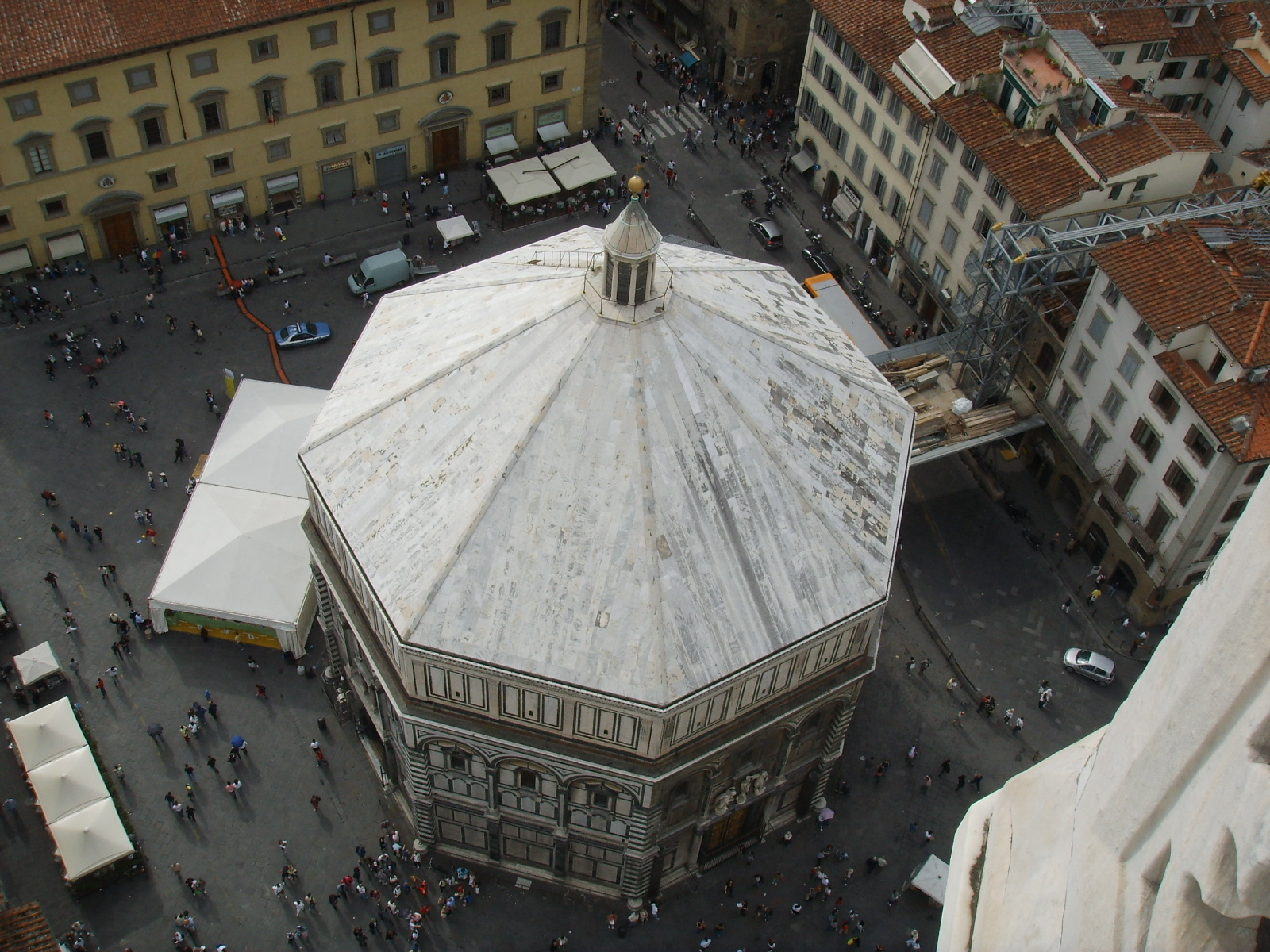 Il Battistero di San Giovanni e la Piazza san Giovanni, a Firenze